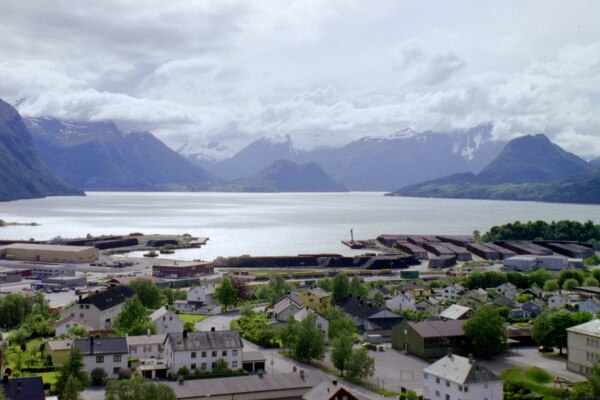 Åndalsnes, Åndalsnes